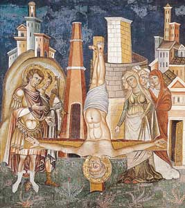 Sancta sanctorum, crocifissione di pietro